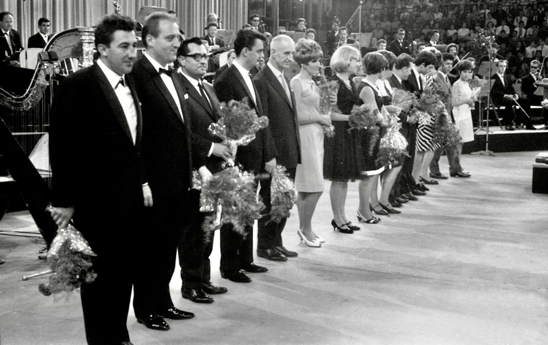 Festival Slovenska popevka v Tivoliju.